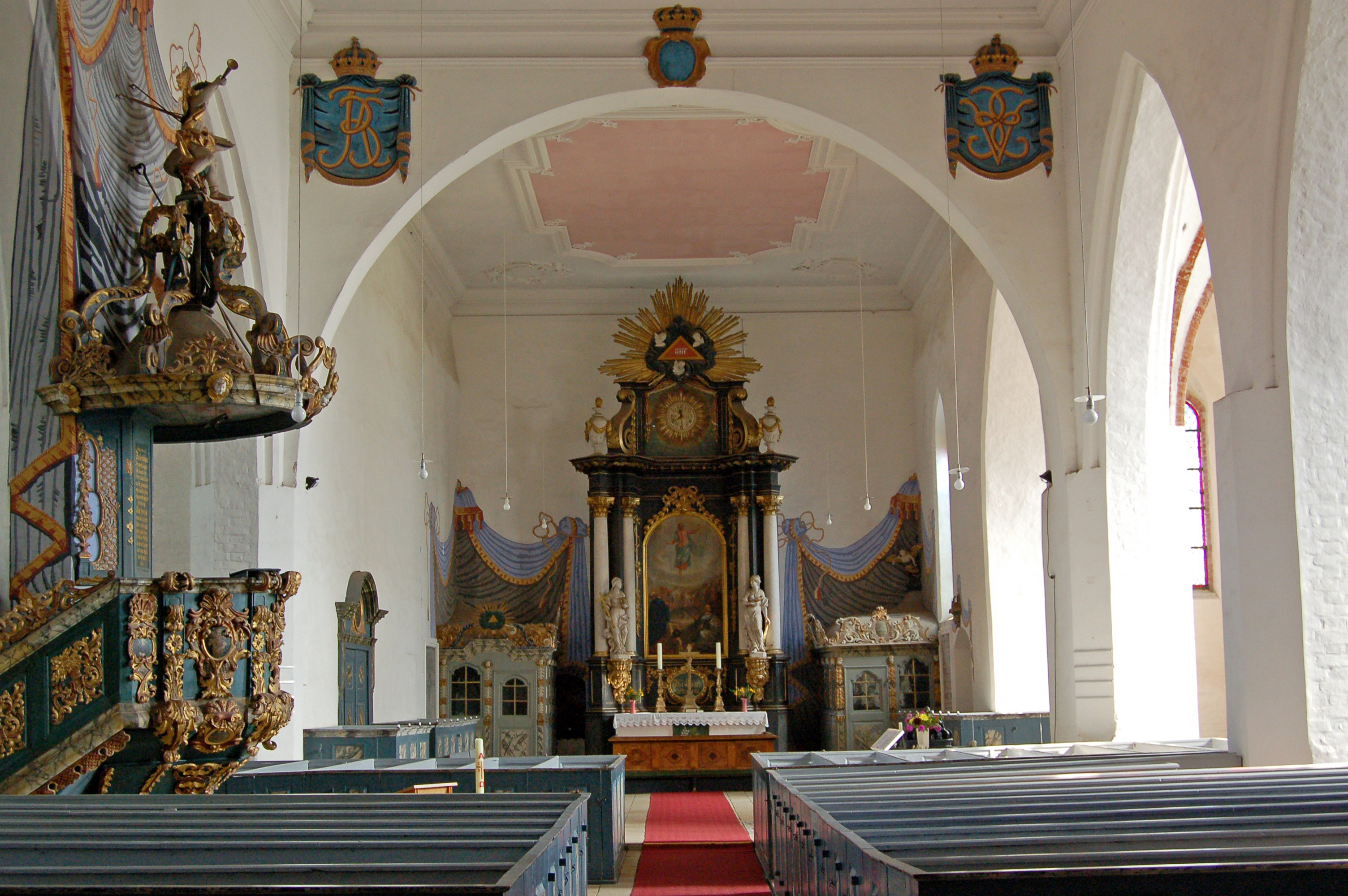 Die Kirche entstand, möglicherweise erst als Kapelle, um 1300. Aus etwa dem Jahr 1400 dürfte das dreischiffige Kirchenschiff stammen. Der quadratische Kirchturm an der Westseite entstand im 15. Jahrhundert. Das Ziffernblatt hat einen Durchmesser von zwei Metern. Nach einem Großbrand in Gingst 1726 erhielt der Turm seine geschweifte Haube. Die Stuckdecken in Chor und Mittelschiff entstanden nach 1726. Das Kastengestühl stammt aus der Zeit um etwa 1730. Die Orgel wurde 1790 von Christian Kindten erbaut.